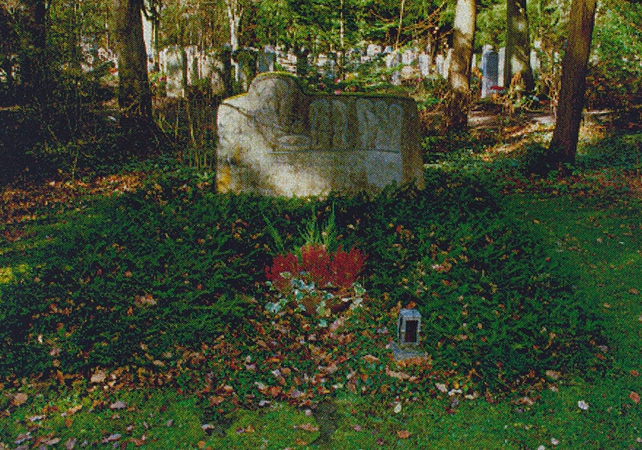 Waldfriedhof München-Heli Finkenzeller